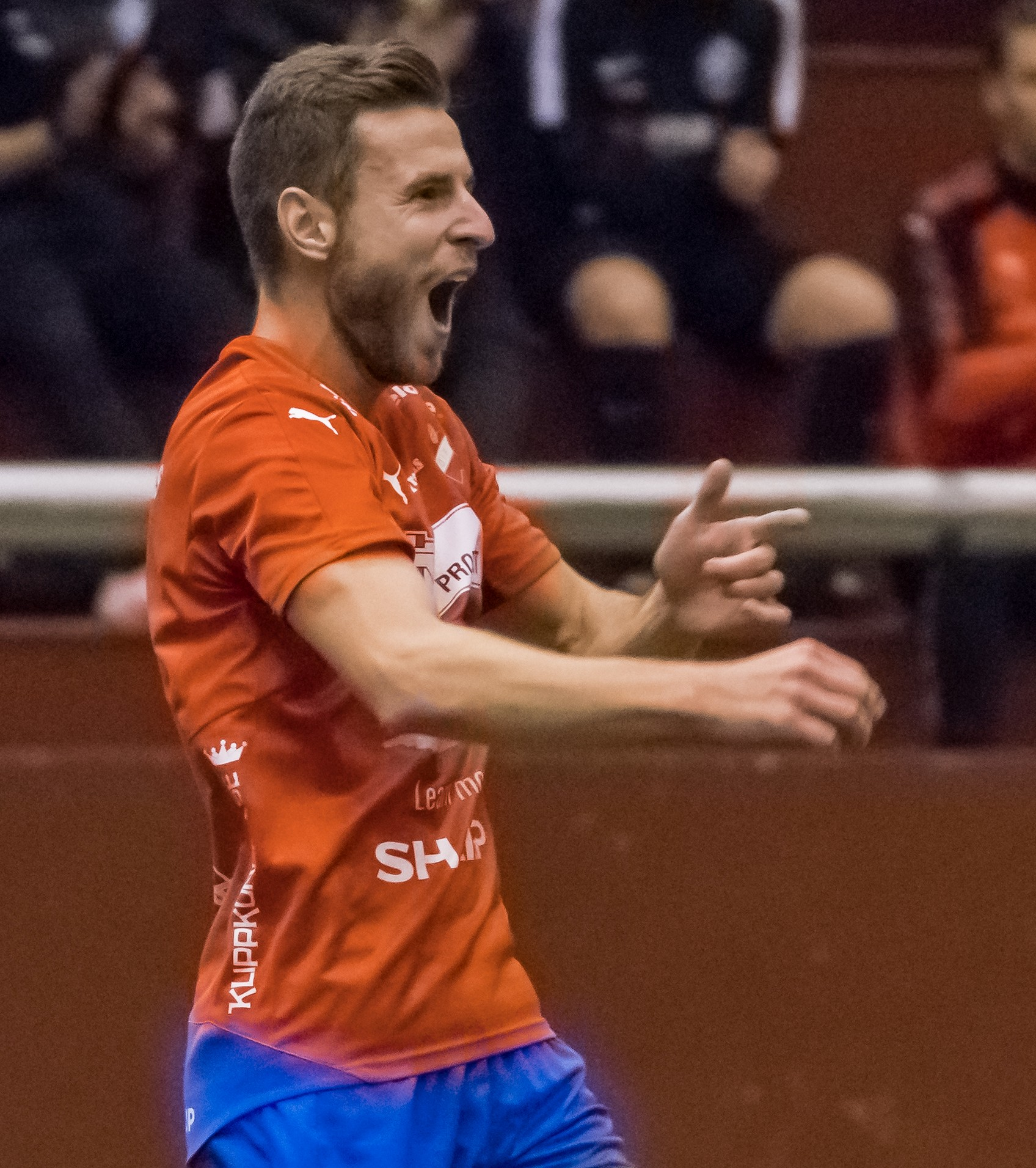 Anfallaren Admir Bajrovic jublar efter sitt första mål för Östers IF, i träningsmatchen mot Falkenbergs FF i februari 2017.